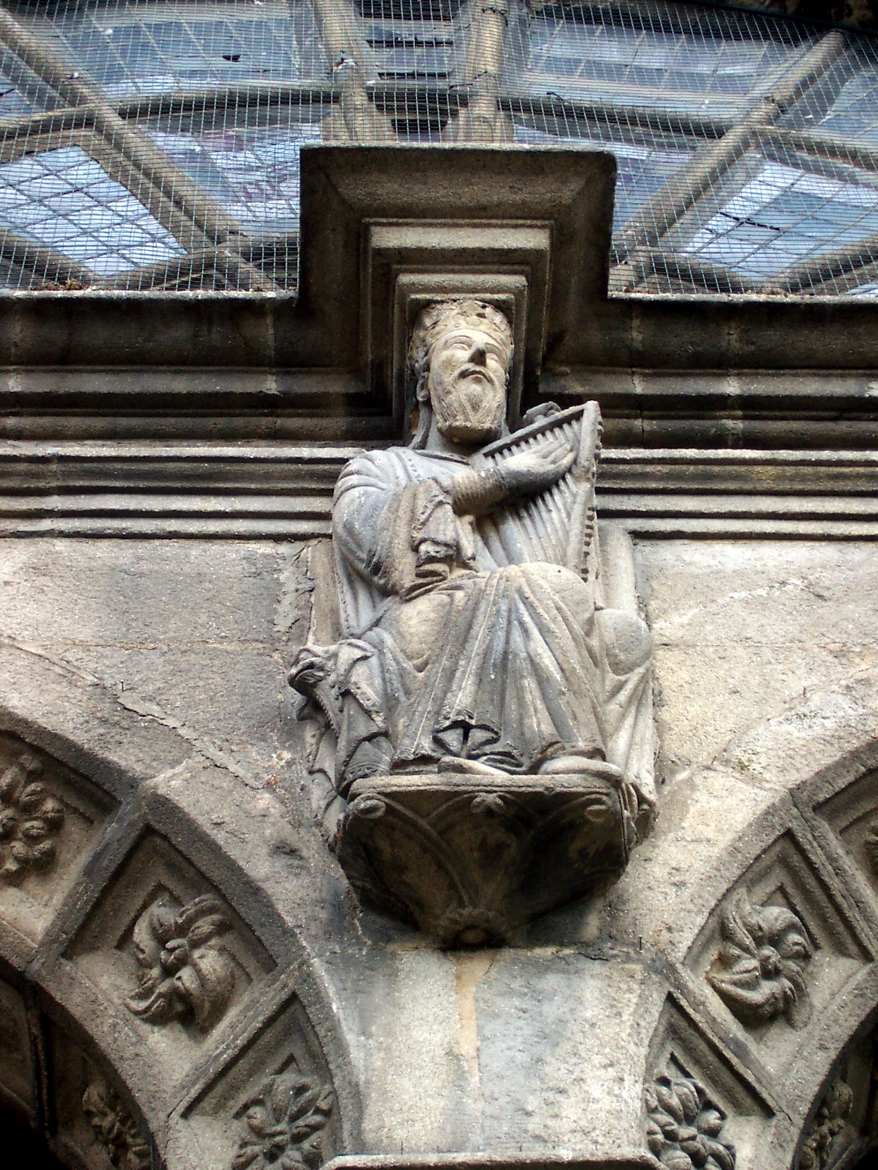 figuras de arpista no exterior da Catedral de Ourense.